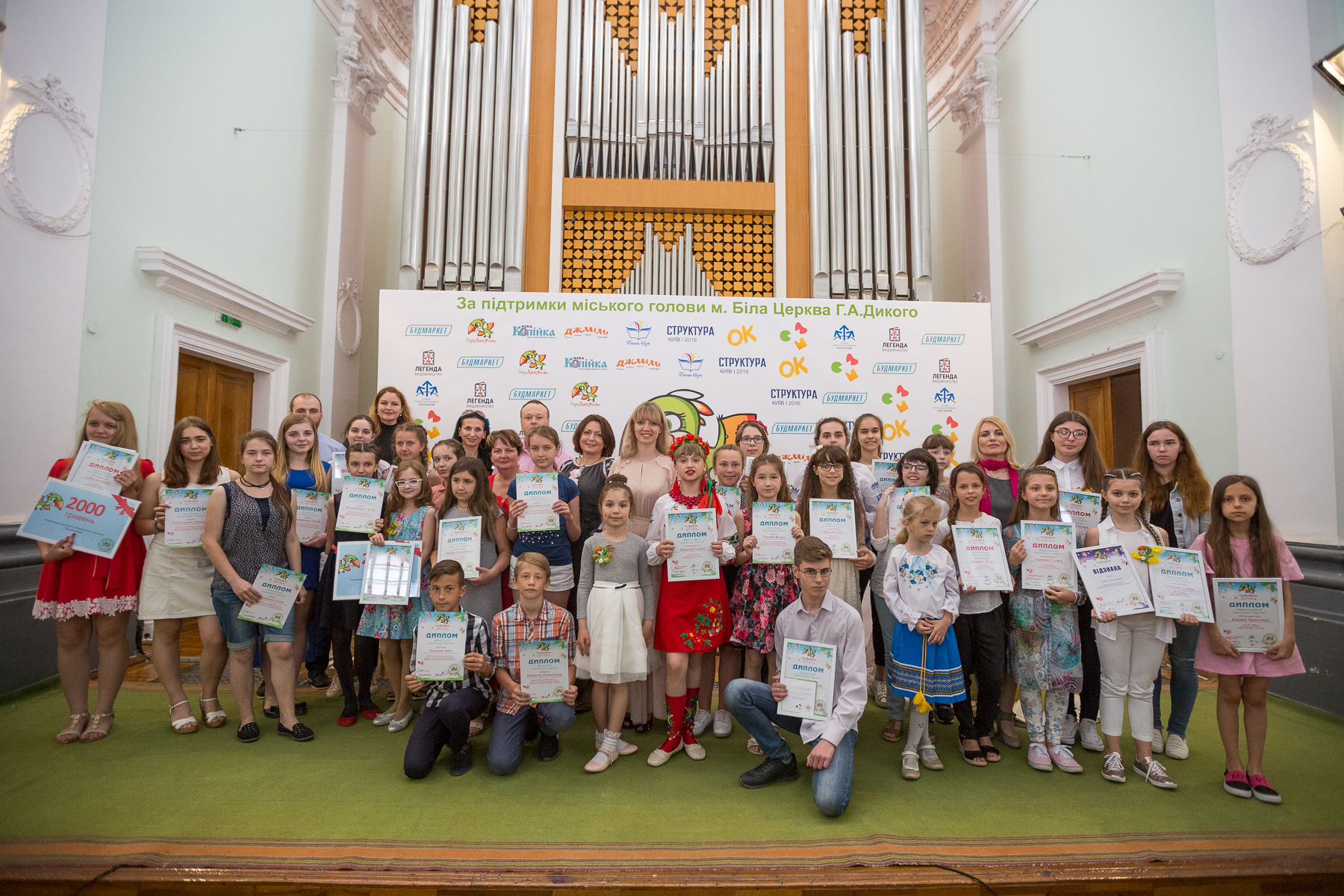 Переможці та організатори дитячого літературного конкурсу "ПероДактиль" 2017-2018 рр.